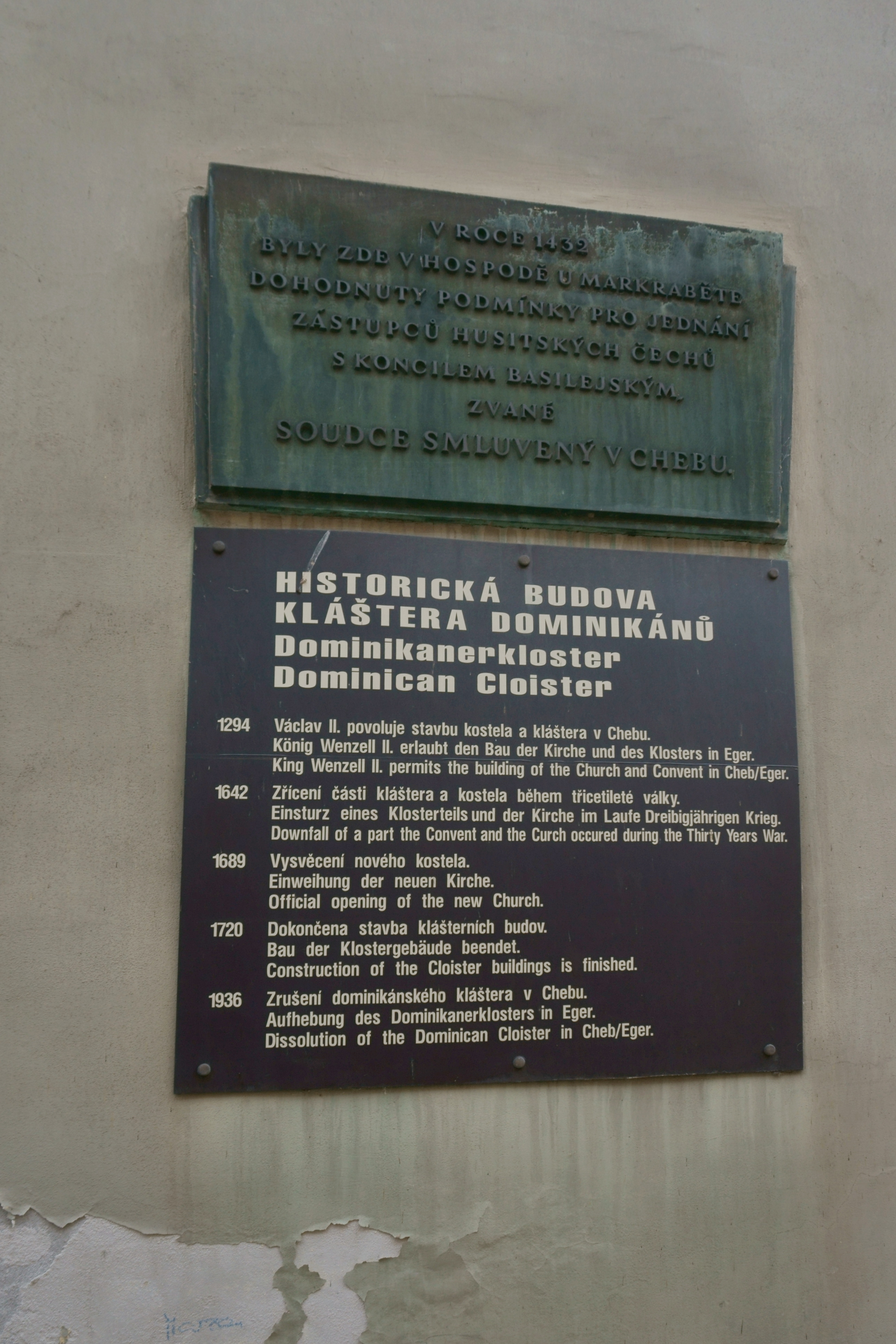 Cheb - dominikánský klášter deska. Horní bronzová deska připomíná uzavření tzv. Soudce smluveného v Chebu (Chebský soudce, Richter von Eger, Iudex Egrensis) v hospodě U Markraběte roku 1432. Dolní novější deska připomíná dějiny dominikánského kláštera.